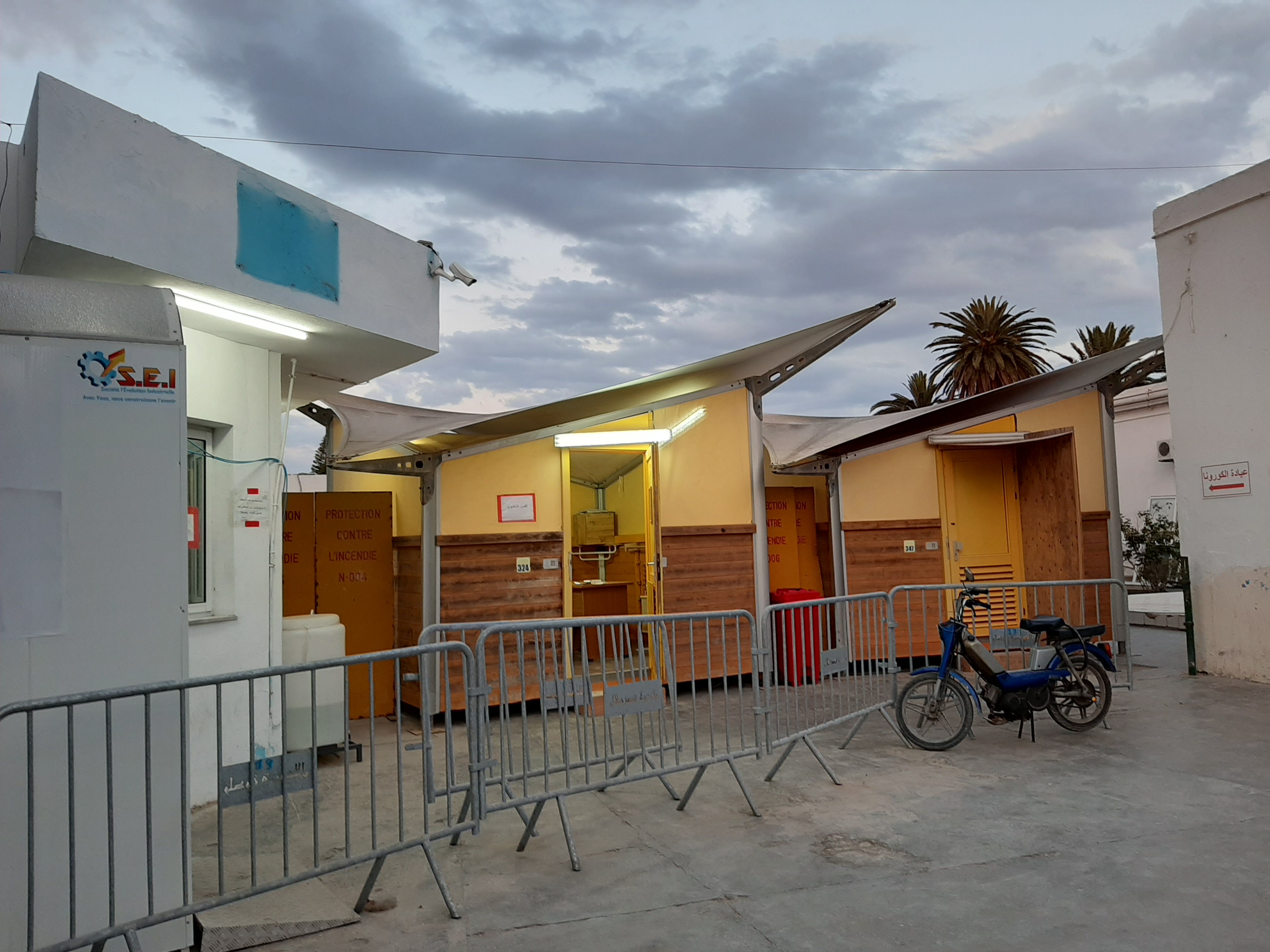 Tunnel spécial circuit Covid-19 à l'hôpital régional Hadj Ali Soua de Ksar Hellal, Tunisie